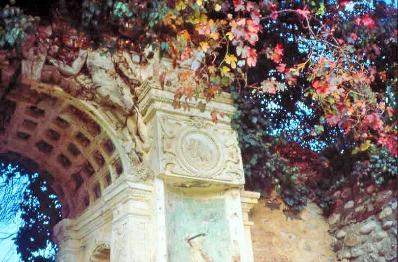 Arco de Abadía-Cáceres